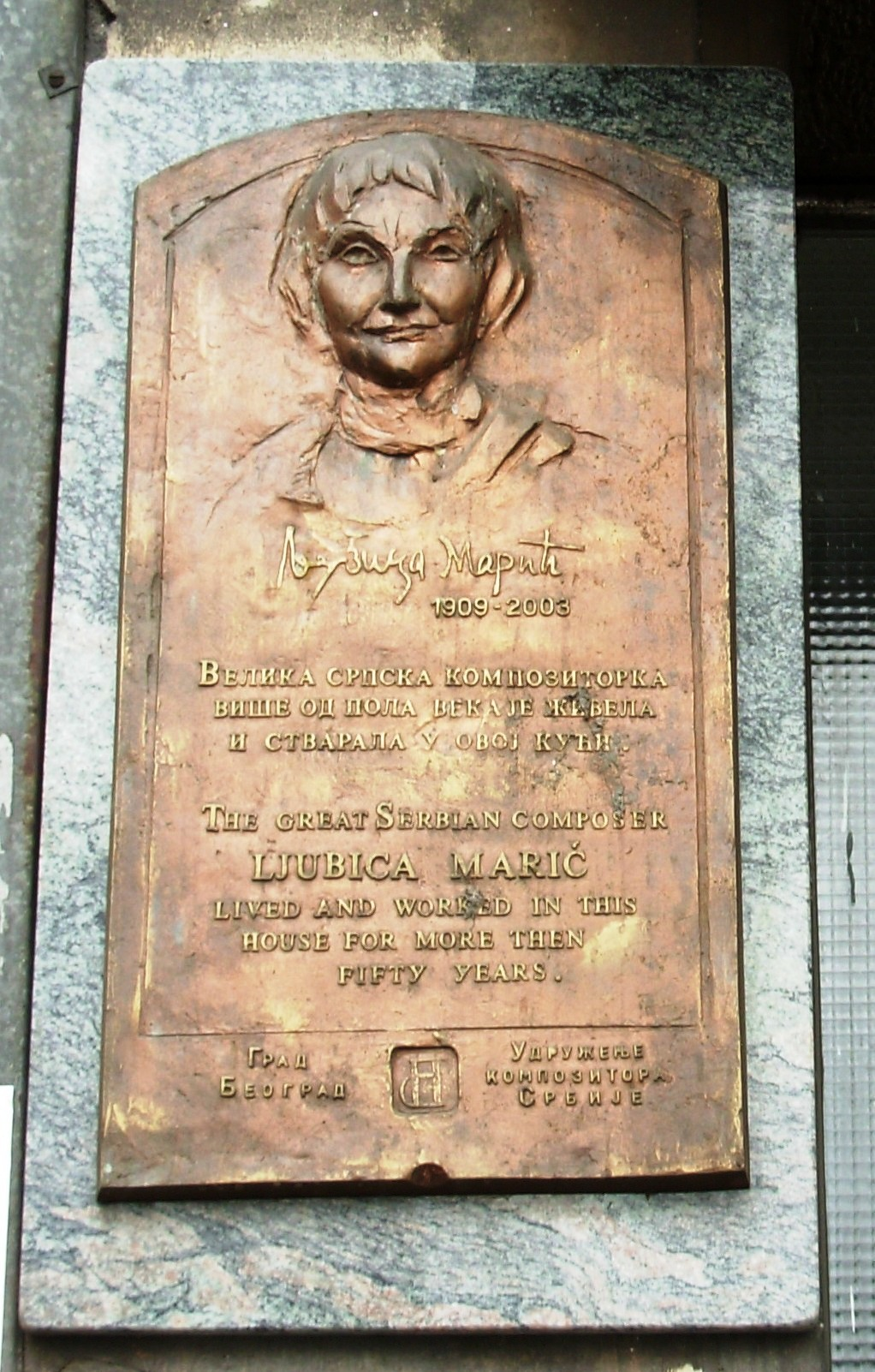 Tabla na zgradi gde je stanovala Ljubica Marić. Slikao Goldfinger